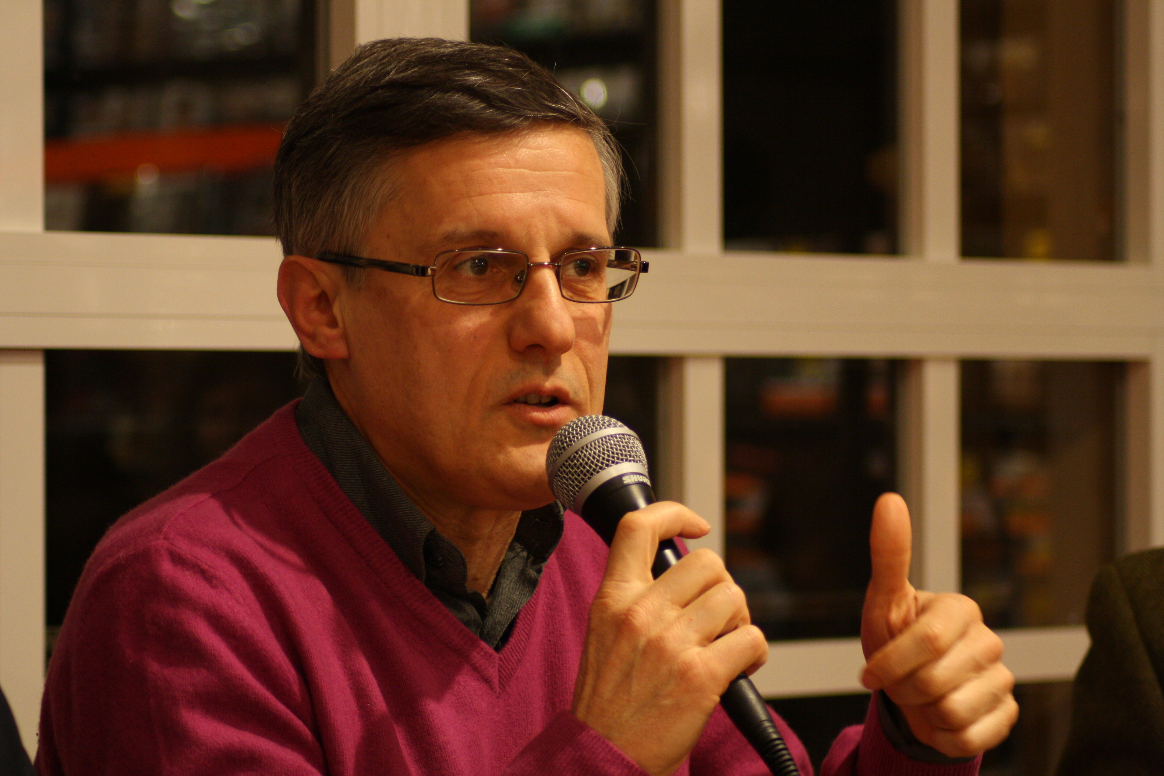 Lo scrittore Valerio Varesi